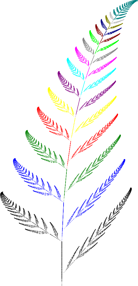 Druhá afinní funkce vykresluje při opakovaném volání vyšší patra Barnsleyho kapradiny